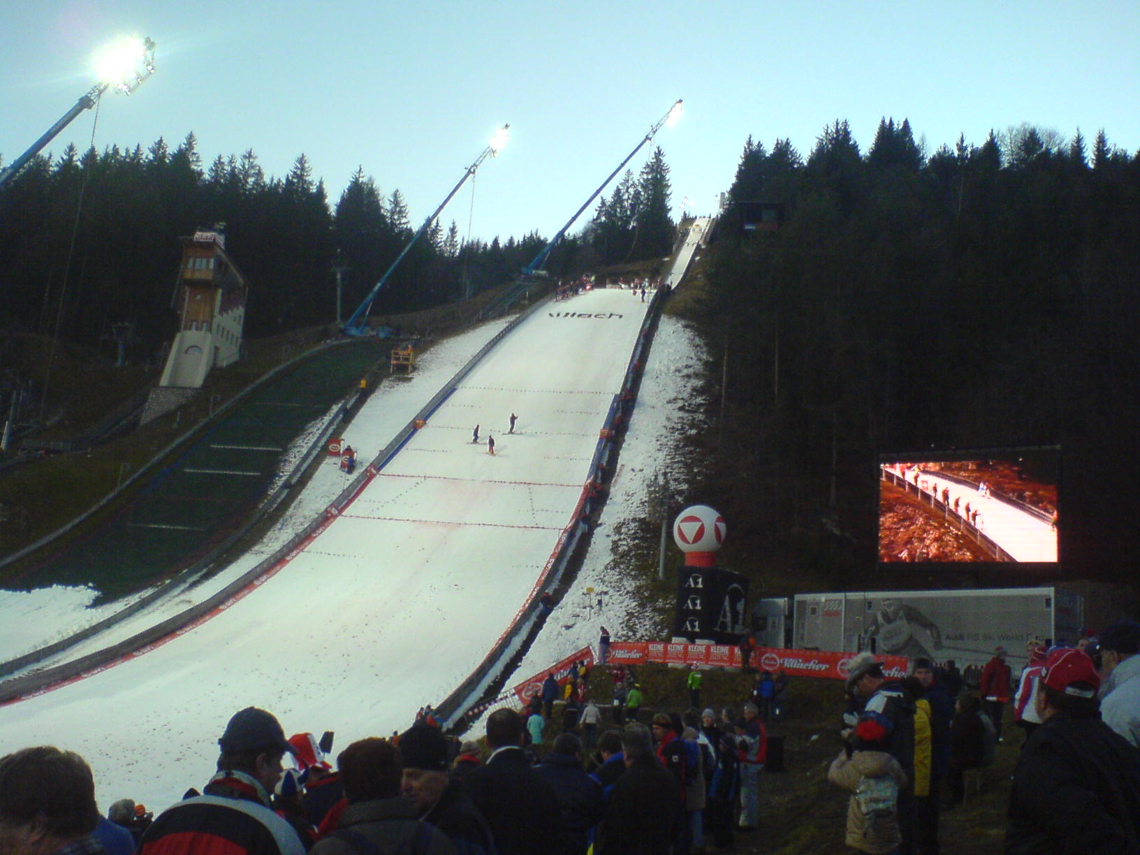 Villacher Alpenarena bei einem Weltcupspringen